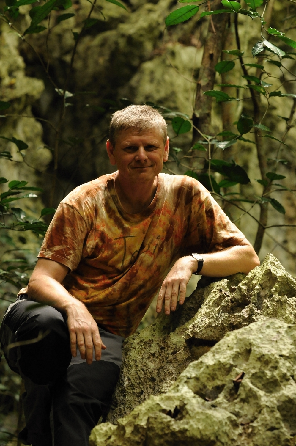 Photographs by Topi Pigula